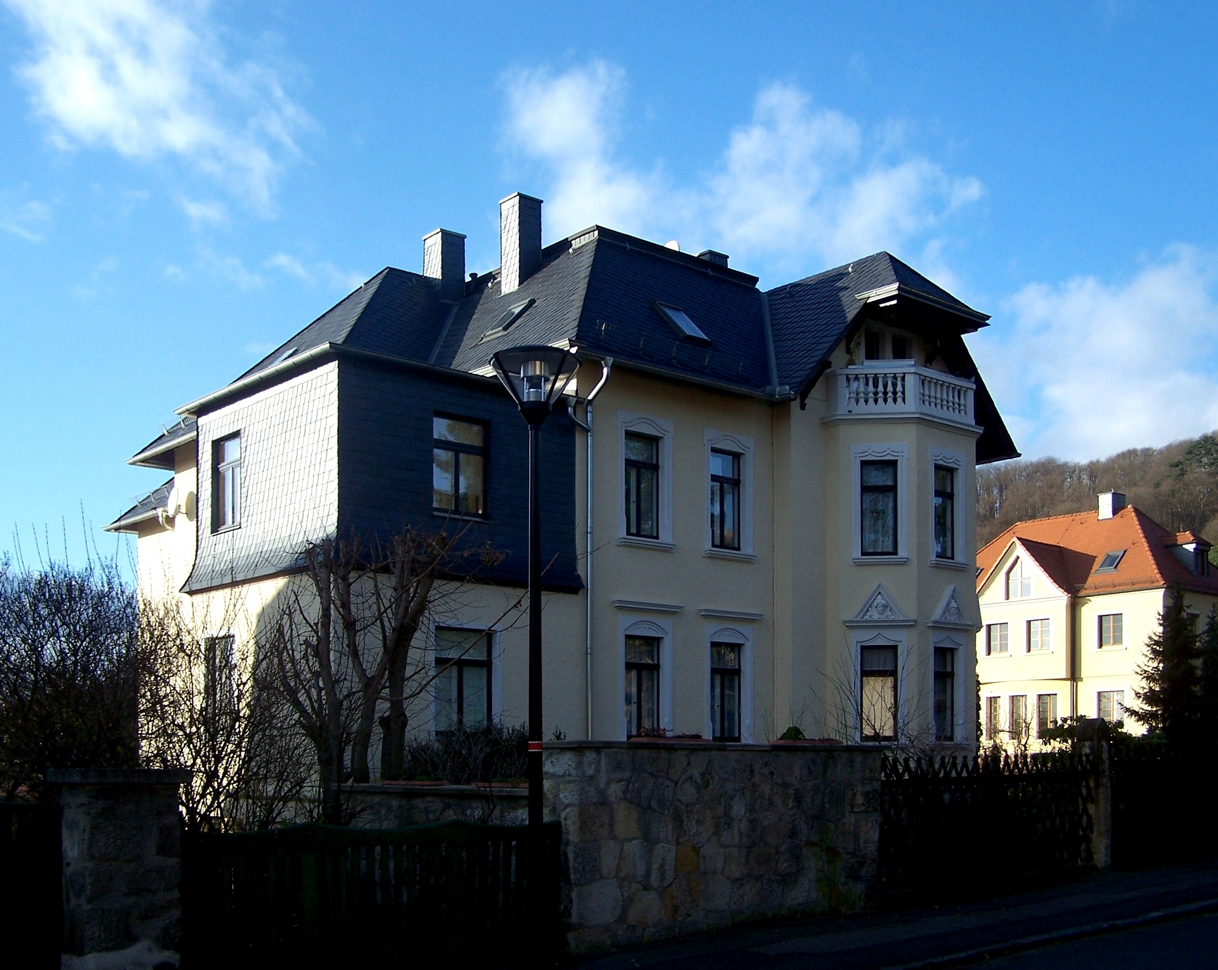 Wettinstr. 16 in Radebeul